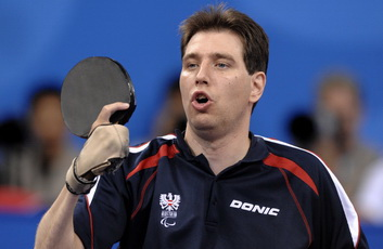 Andreas Vevera bei den Paralympics 2008